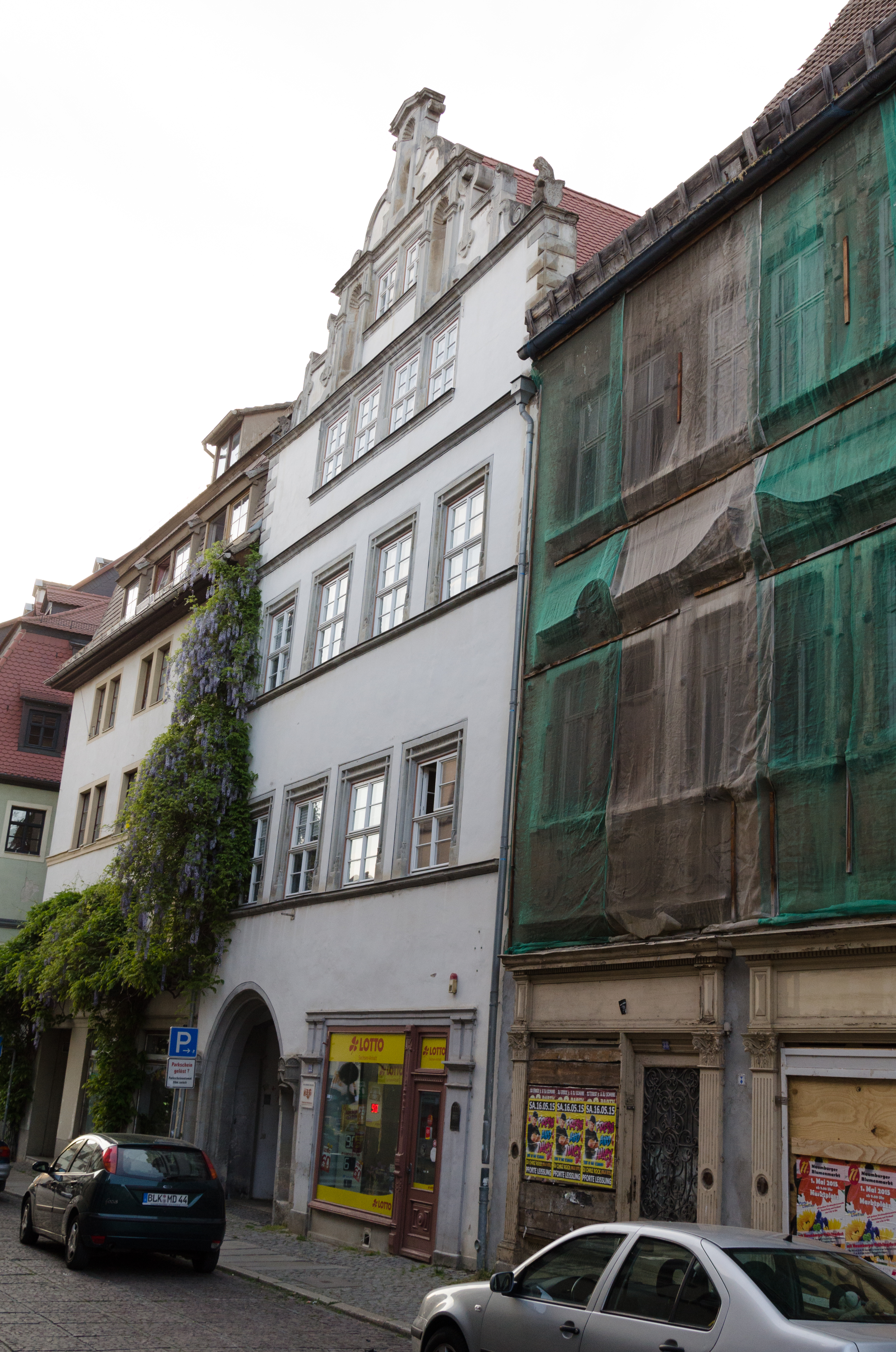 Naumburg, Marienstraße 40, 39